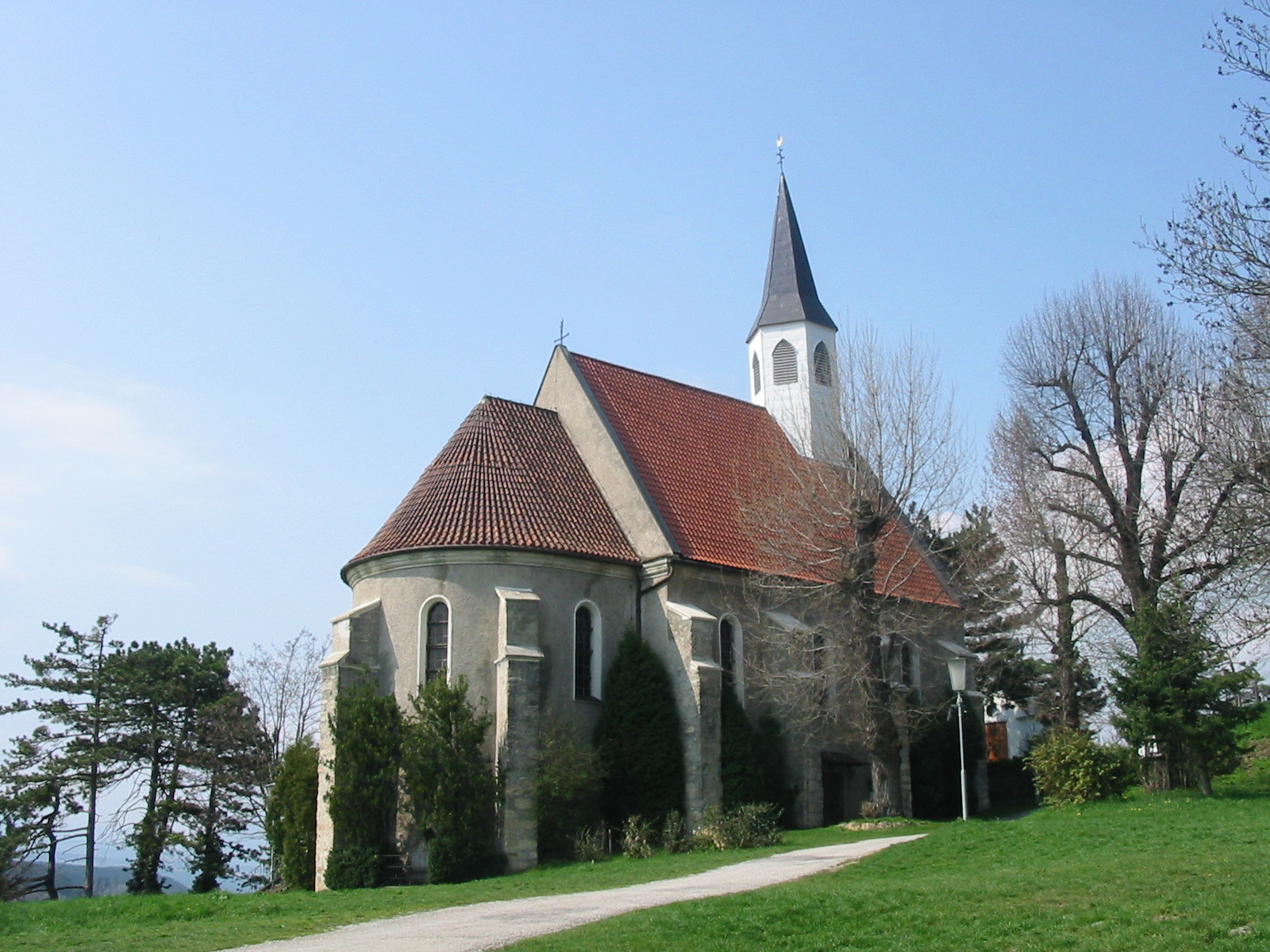 Peterskirche in Dunkelstein-Blindendorf